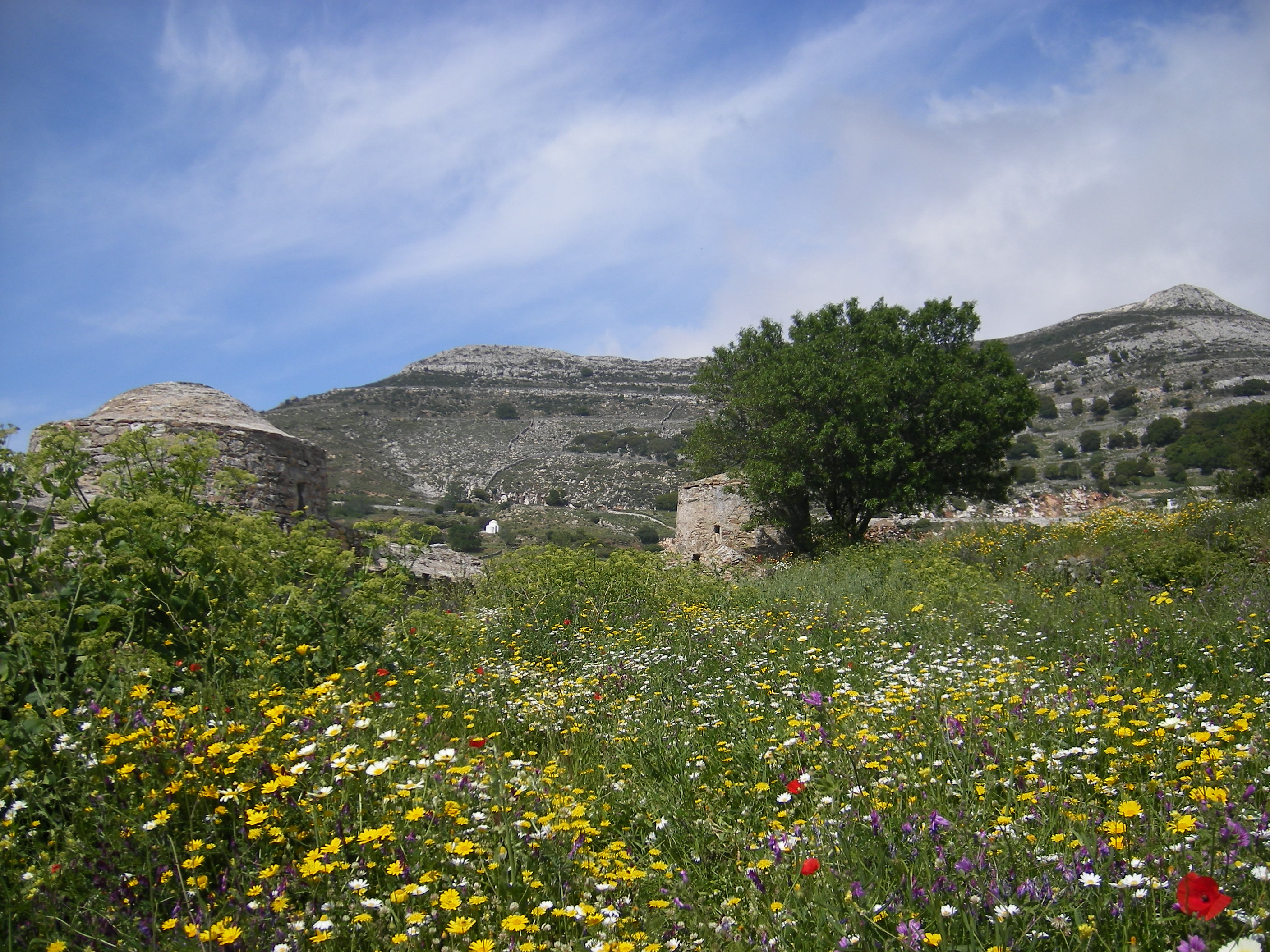 Aghios Pakhomos et Aghios Georgios, Apiranthos, Naxos